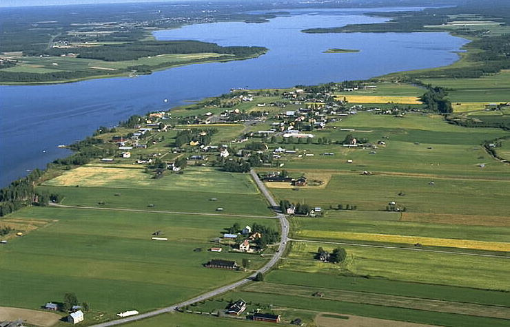 Motiv: Avan Nyckelord: Flygbilder, Riksintressen Kategori: Jordbruksby Avan